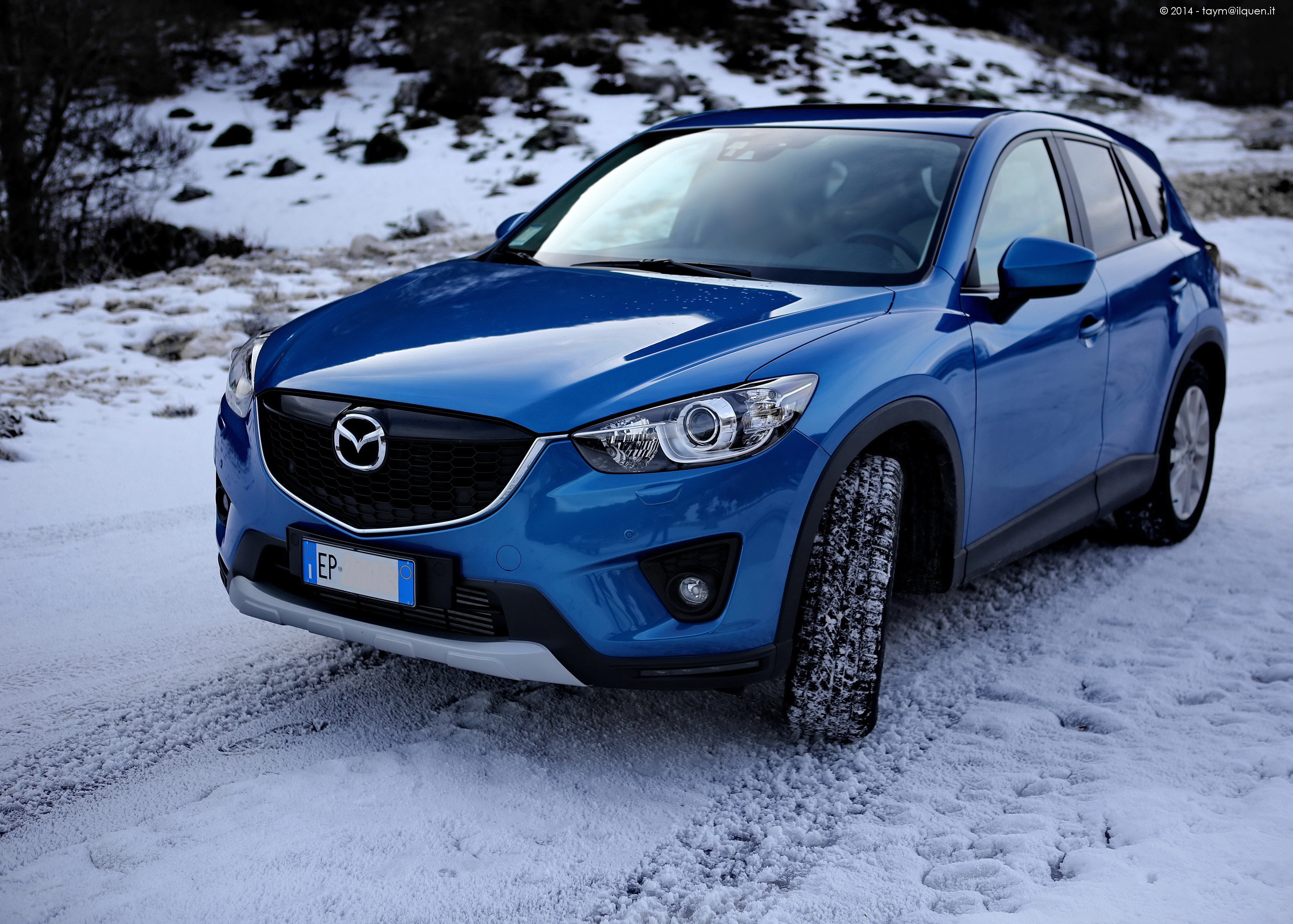 Maza CX-5